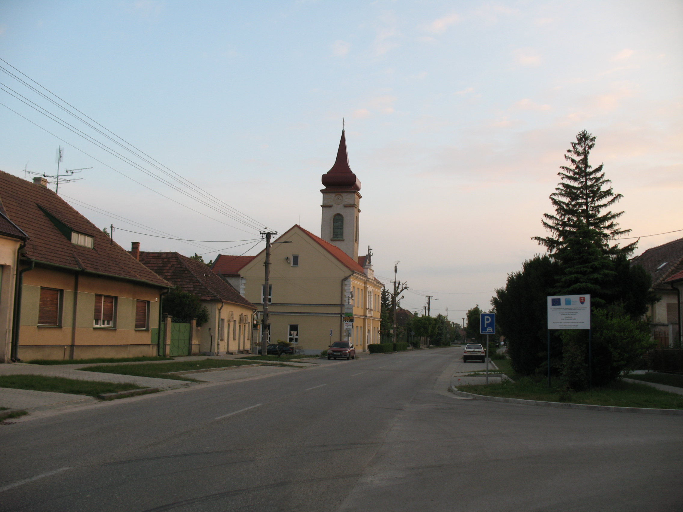 Vágkeresztúr